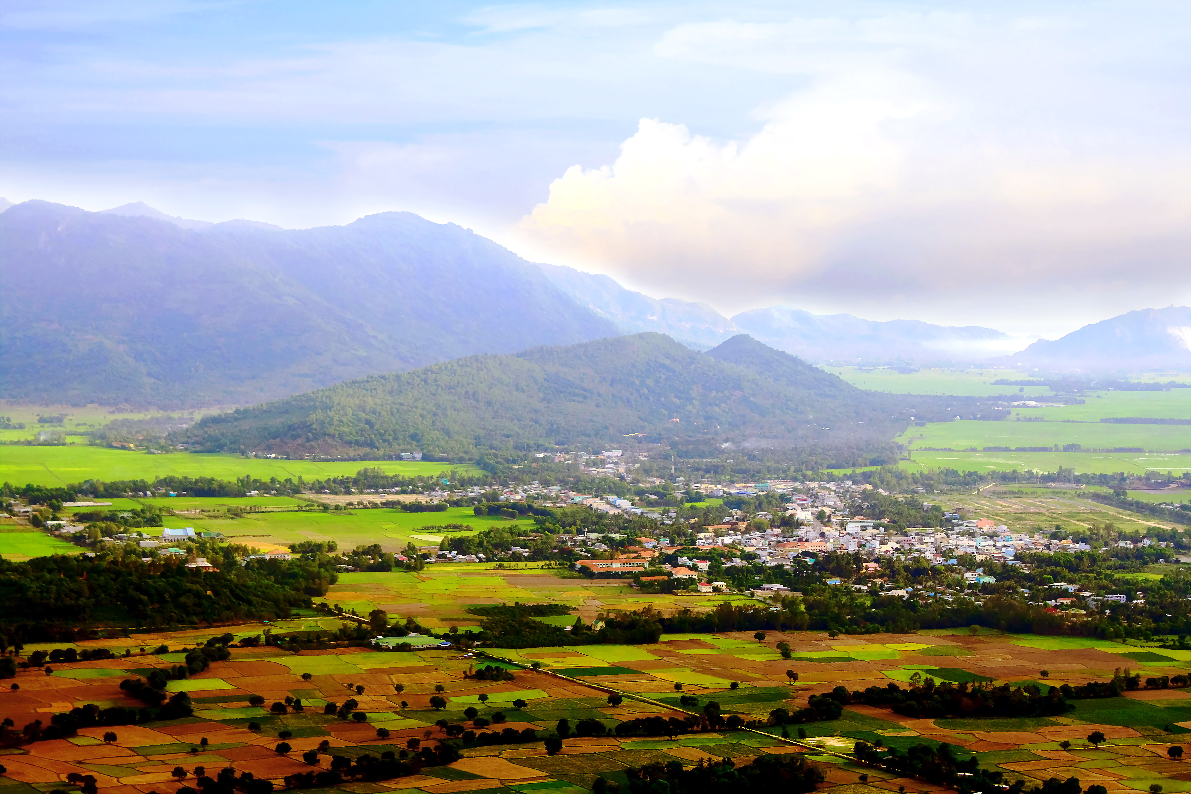 Từ trên đỉnh núi Tô (Phụng Hoàng Sơn) nhìn xuống thị trấn Tri Tôn, thuộc huyện Tri Tôn, An Giang, Việt Nam.